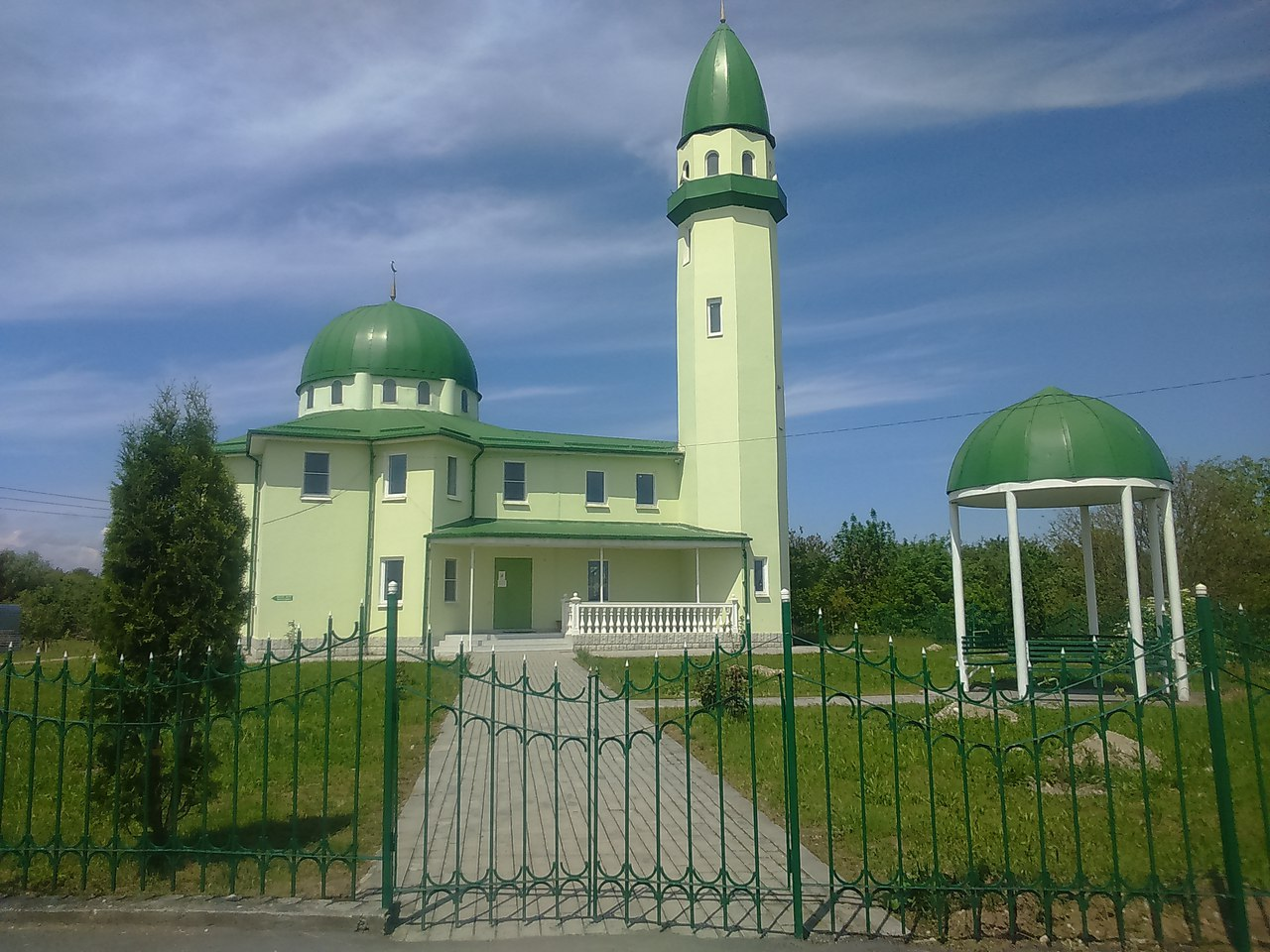 Центральная мечеть Аргудана